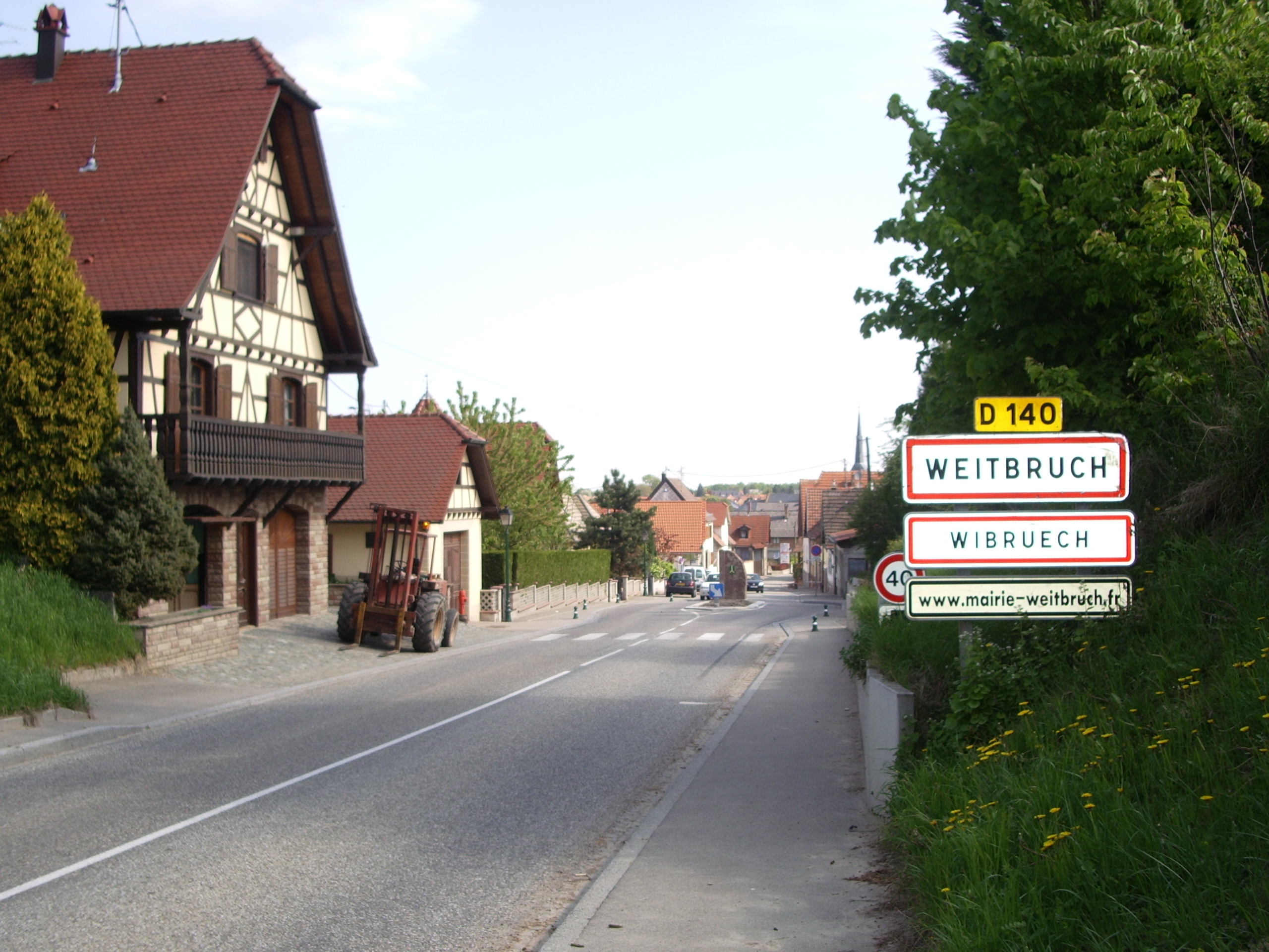 Vue de l'entrée Sud de Weitbruch, rue de Brumath. La photo montre également le panneau de la commune avec sa version alsacienne et l'adresse internet de la commune.